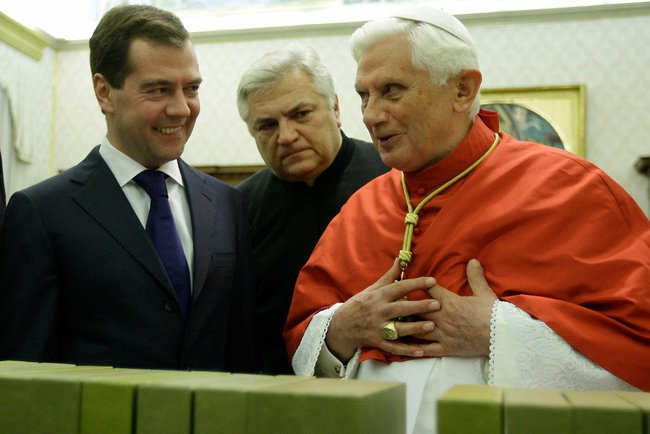 Посещение Ватикана. С Папой Римским Бенедиктом XVI.